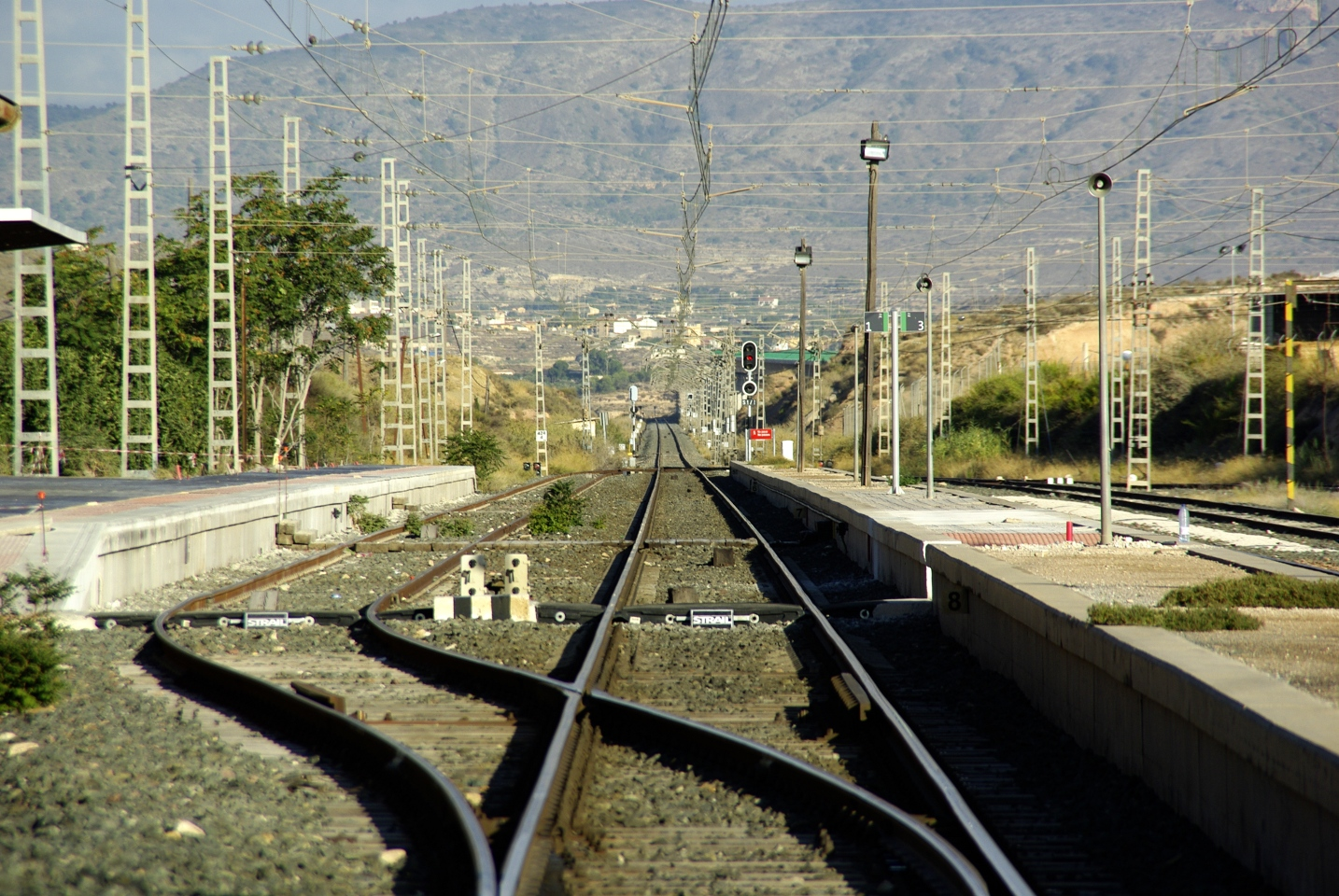 Estación Novelda-Aspe a raz de vías